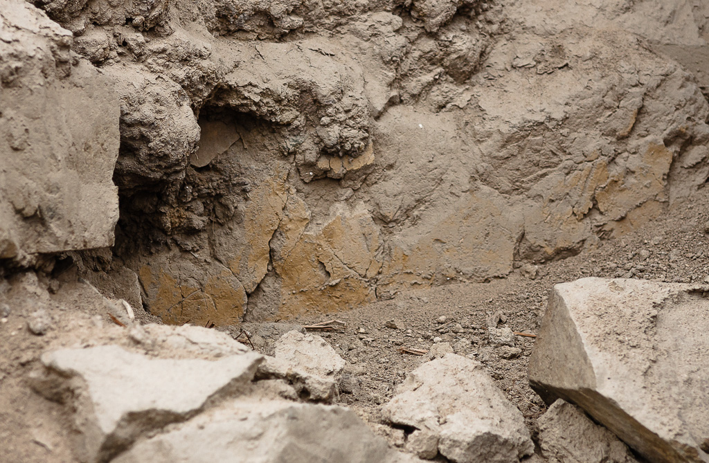 Detalle de policromía mural